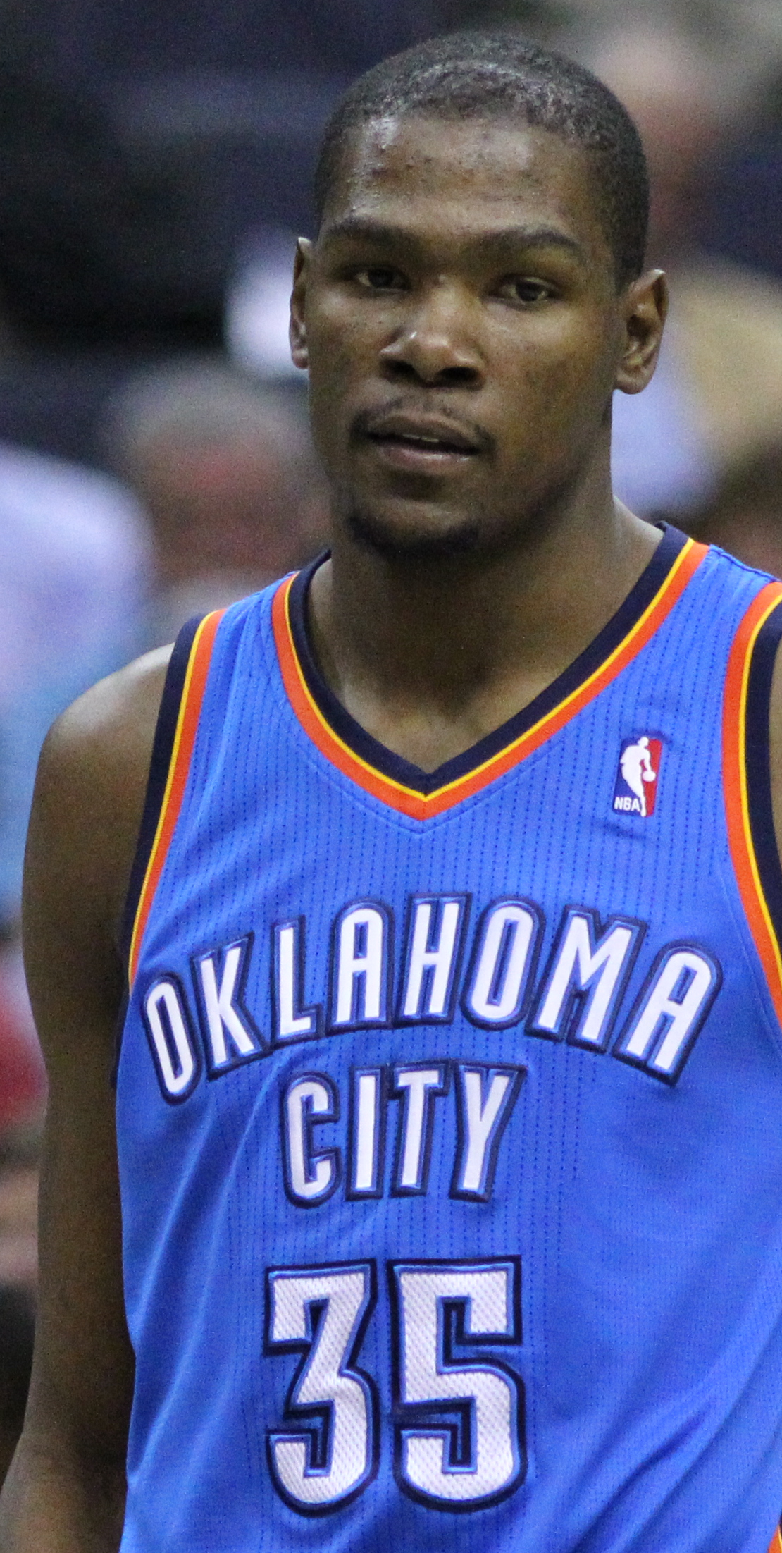 Wizards v/s Thunder 03/14/11